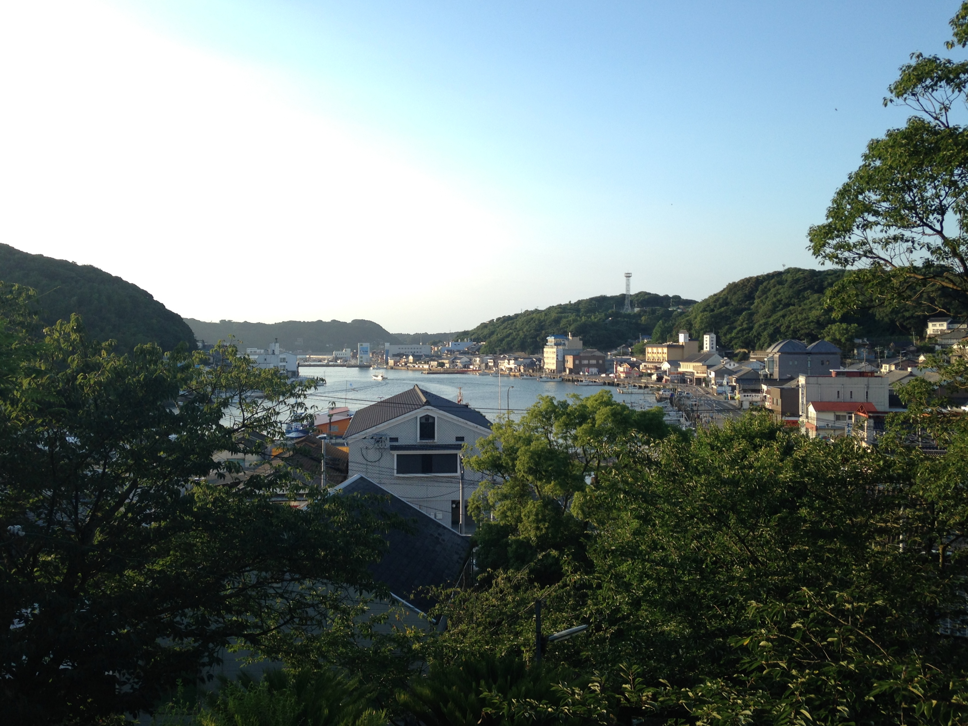 愛宕神社より望む呼子港